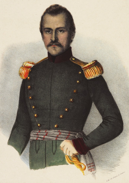 Ulrich Ochsenbein. Der Tagsatzungspräsident in seiner Offiziersuniform, 1847. Farblithografie des Genfer Druckers Charles Gruaz nach einer Zeichnung von Heinrich Fischer, die dieser nach dem lebenden Modell gefertigt hatte